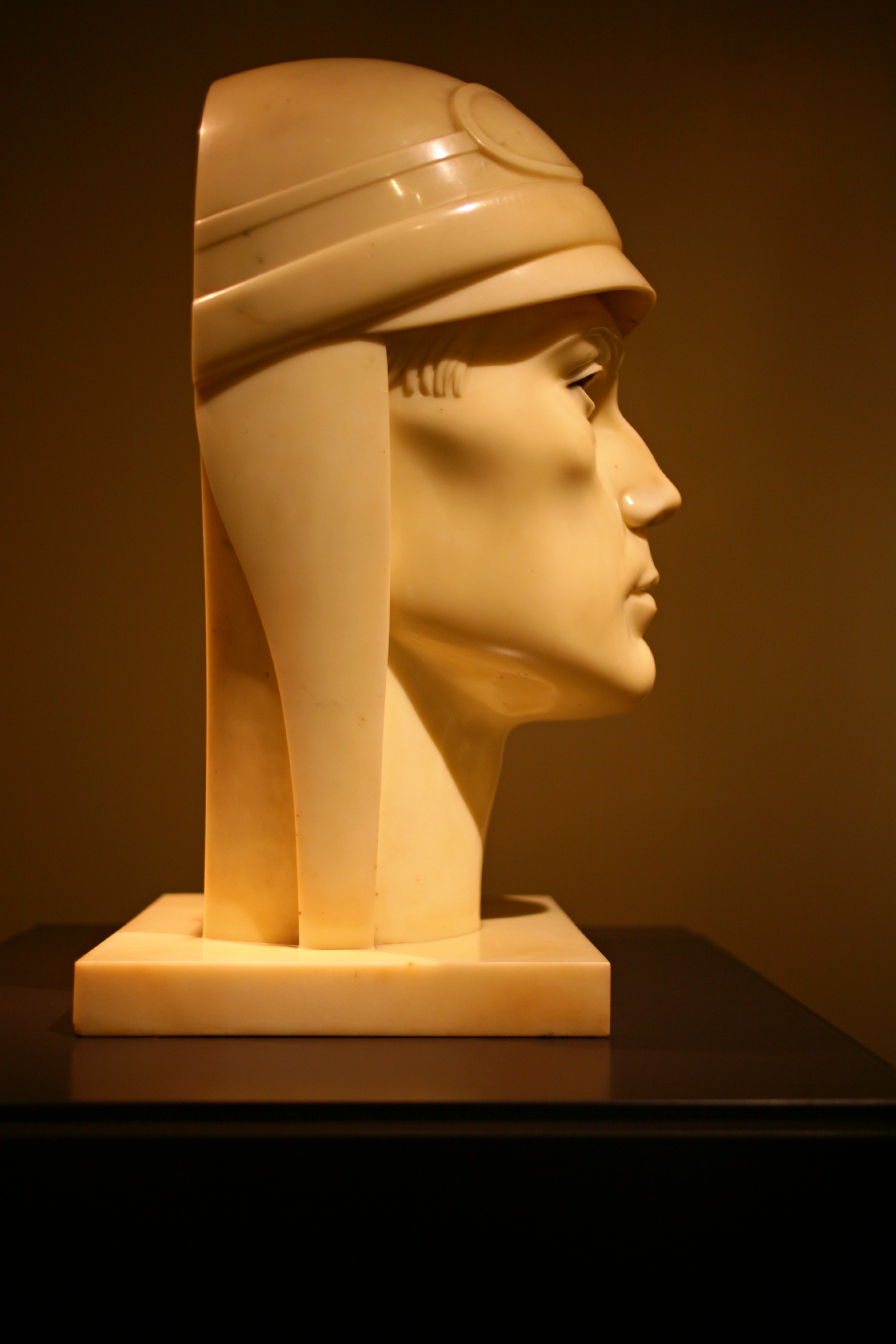 Adolfo Wildt (1868-1931) Arturo Ferrarin (1929) laterale